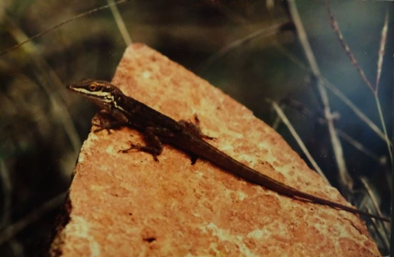 Lagartijo jardinero del sur (Anolis poncensis), en Ponce, Puerto Rico